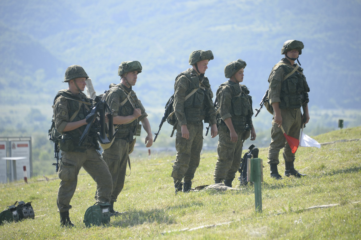 Проверка боевой готовности 4-й гвардейской Вапнярско-Берлинской Краснознамённой, орденов Суворова и Кутузова военной базы на высокогорном полигоне в Южной Осетии.